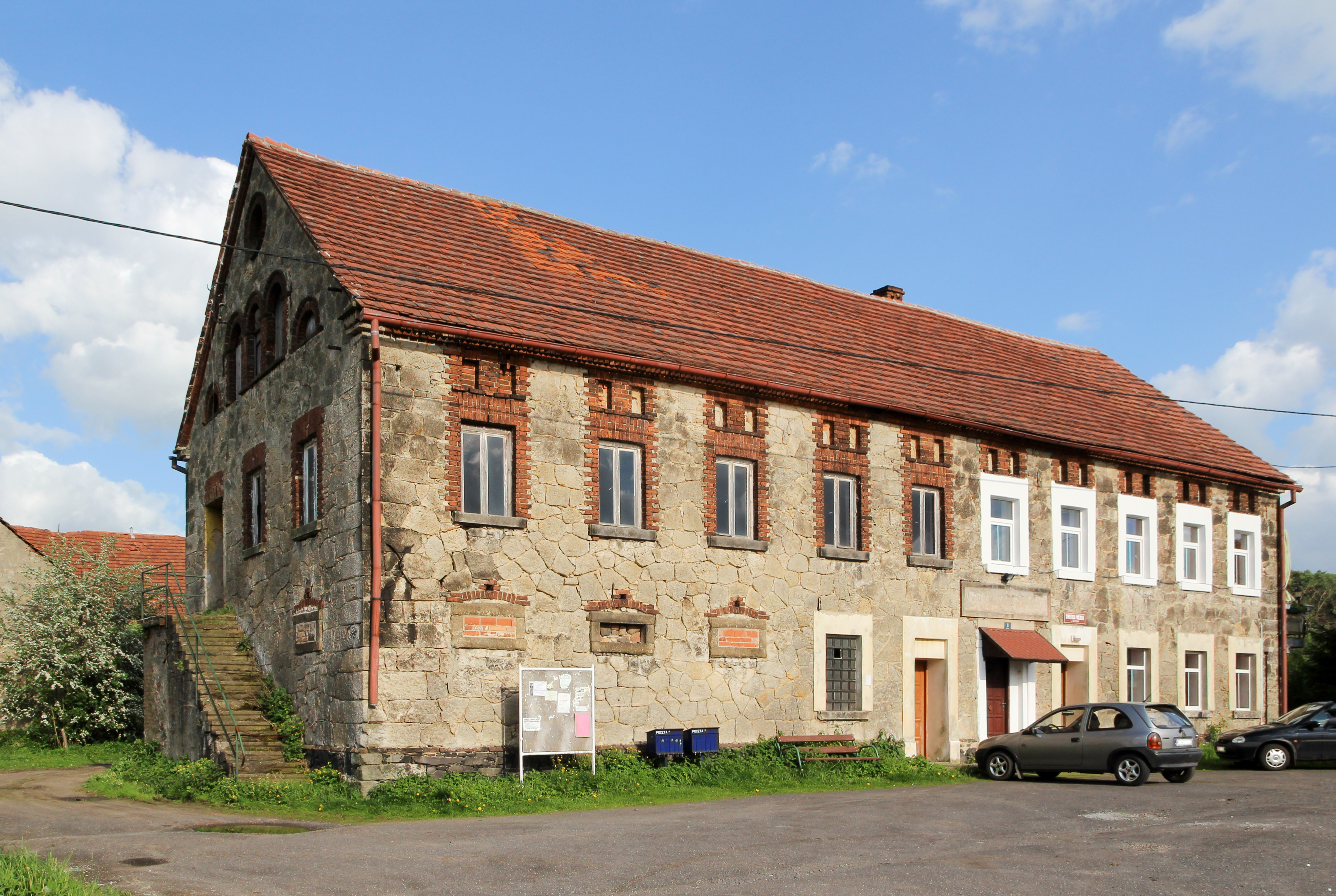 Wyręba – wieś w Polsce, w województwie dolnośląskim, w powiecie lubańskim, w gminie Siekierczyn.